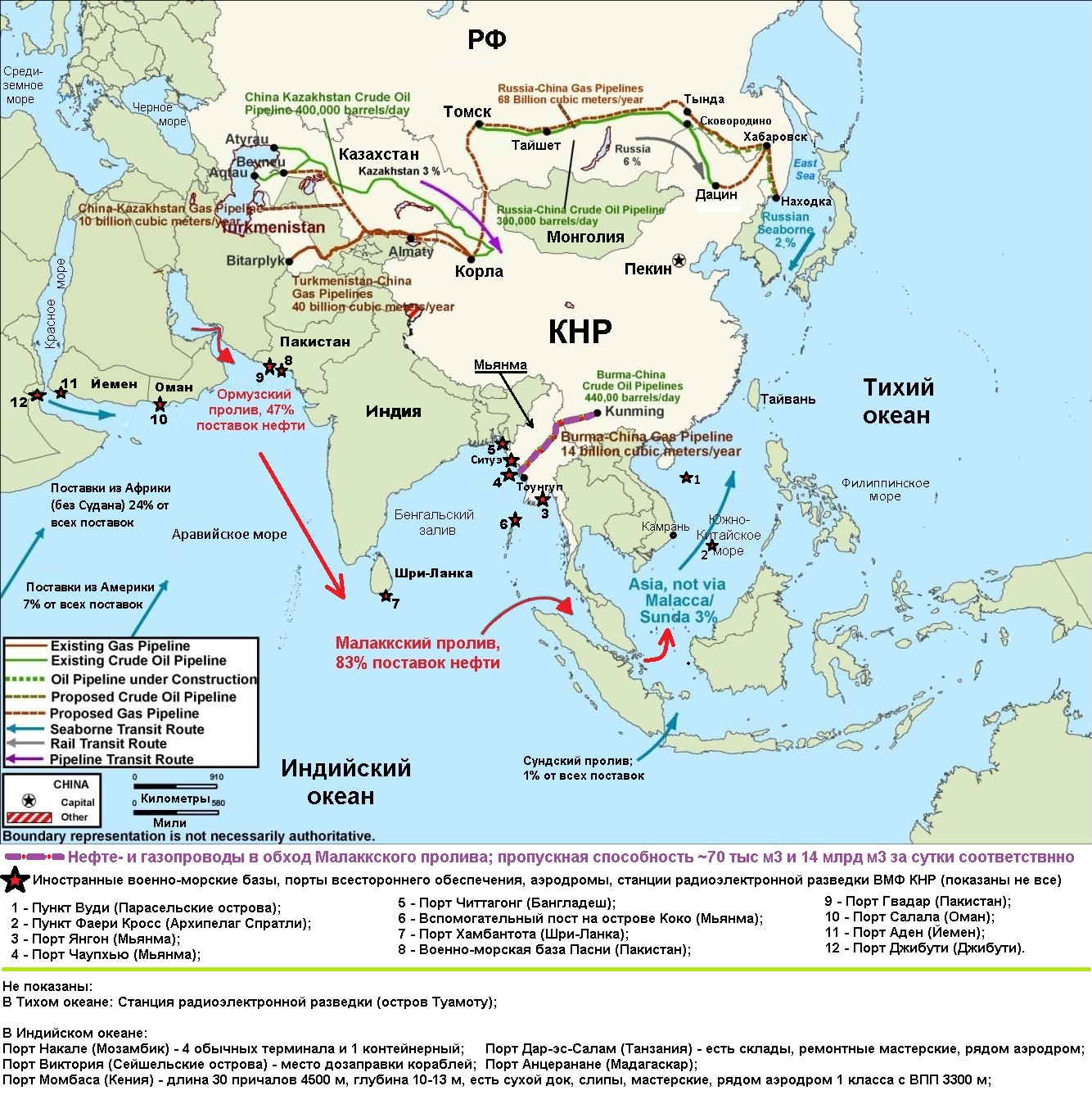 Схема импорта нефти и газа КНР, и размещение китайских военно-морских баз, пунктов снабжения, аэродромов и др. ВМФ НОАК. Иллюстрация сделана путём замены надписей на английском языке, и добавлении мест размещения баз ВМС Китая